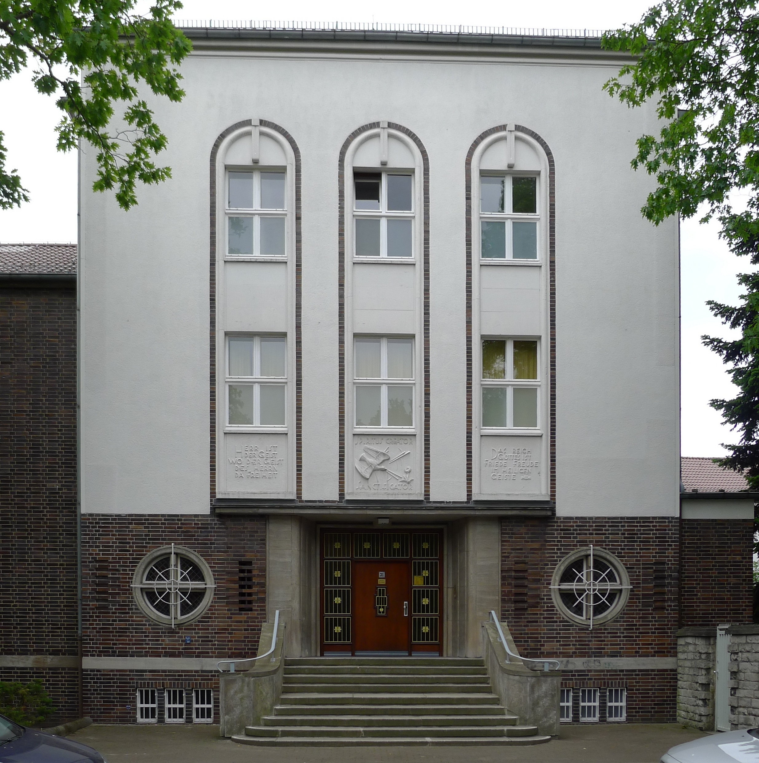 Portal des Klostergebäudes